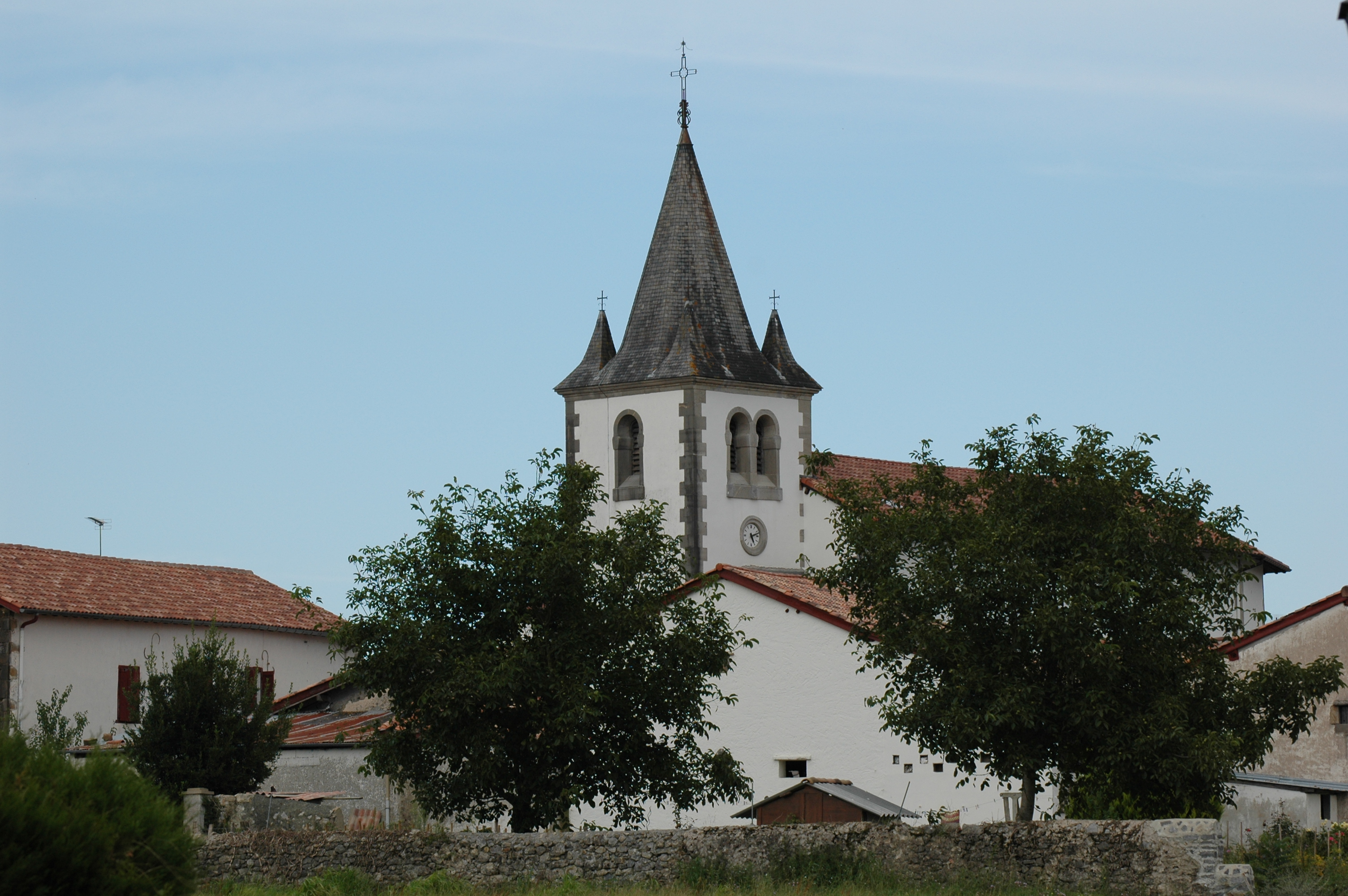 Armendarits, l'église Sainte-Marie